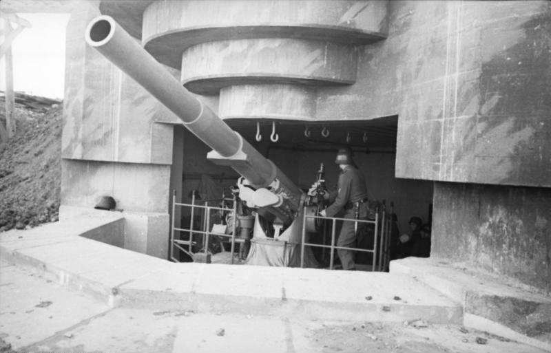 Information added by Wikimedia users.15,5cm Kanone 418(f) in einem Geschützschartenstand 120°(Regelbau 694)